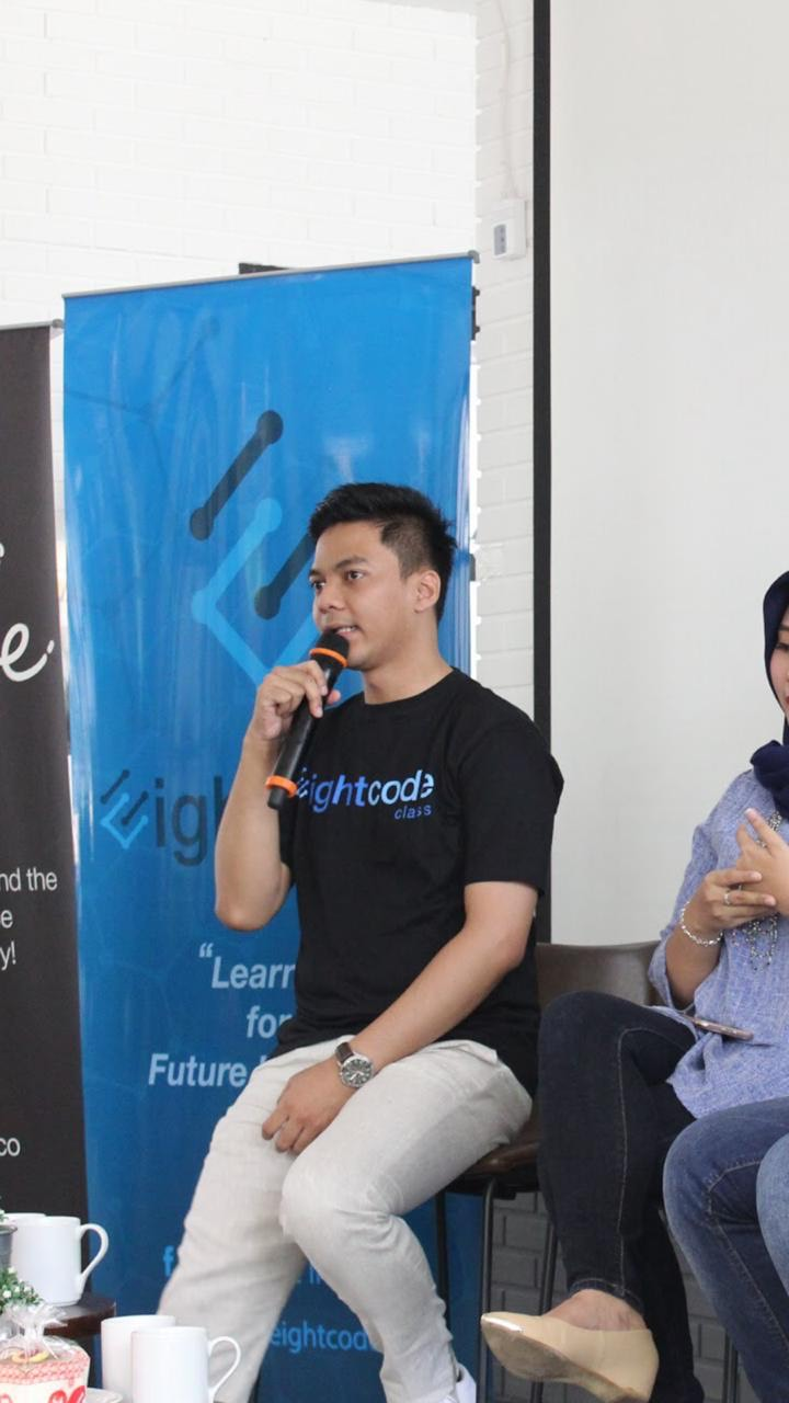 Faizal Hermiansyah mengawali karier di usia 16 tahun. Kini ia menjabat sebagai ketua Himpunan Pengusaha Muda Indonesia, dan berkecimpung di dunia IT sebagai CEO Eight Code Indonesia.